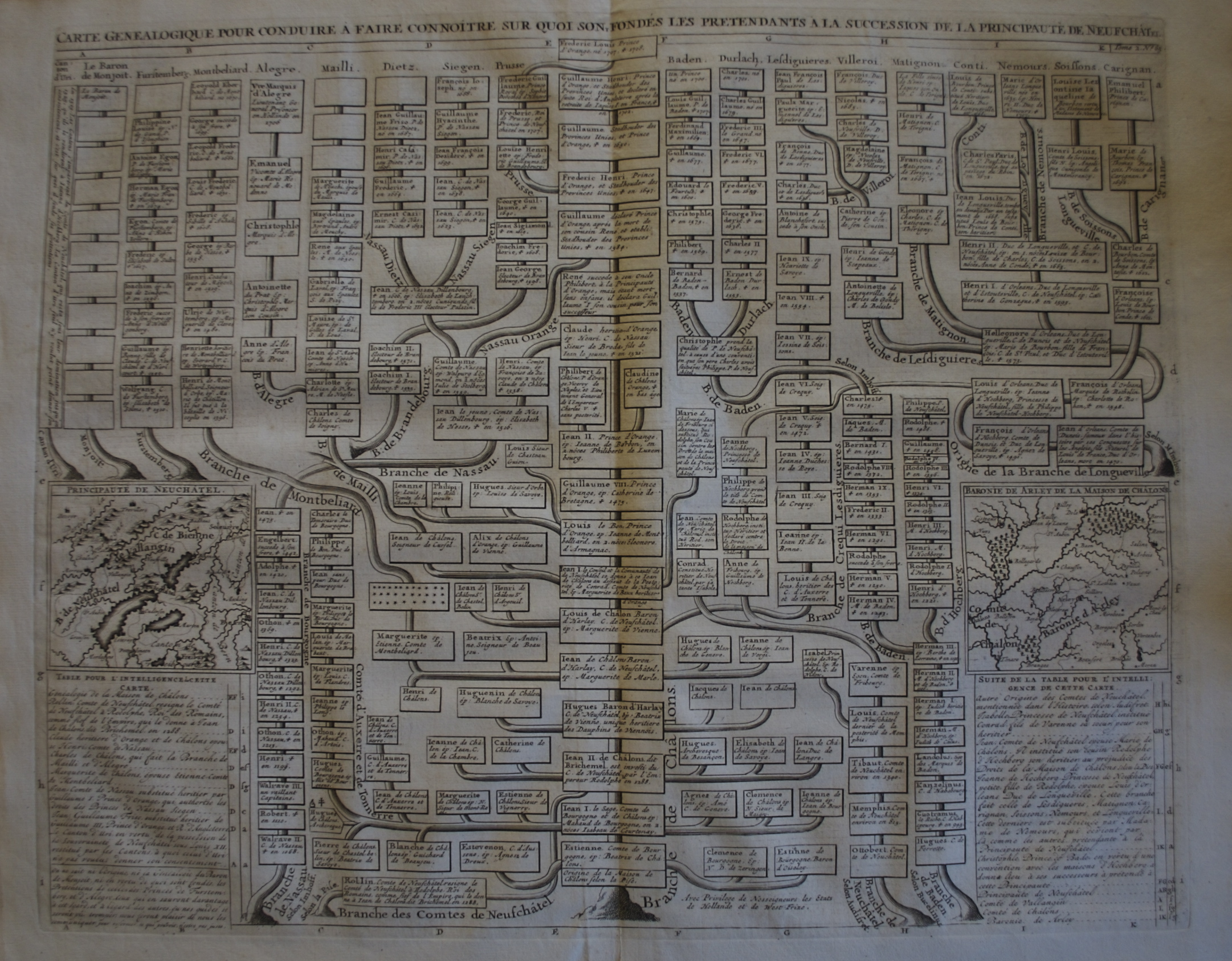 Généalogie établie pour décider de la succession de Marie de Nemour à Neuchâtel